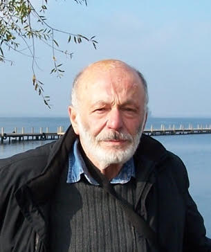 יוחנן לבנון